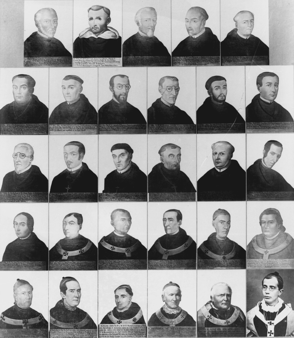 Fotografías de los obispos y arzobispos de Guatemala. Composición de Juan José de Jesús Yas.